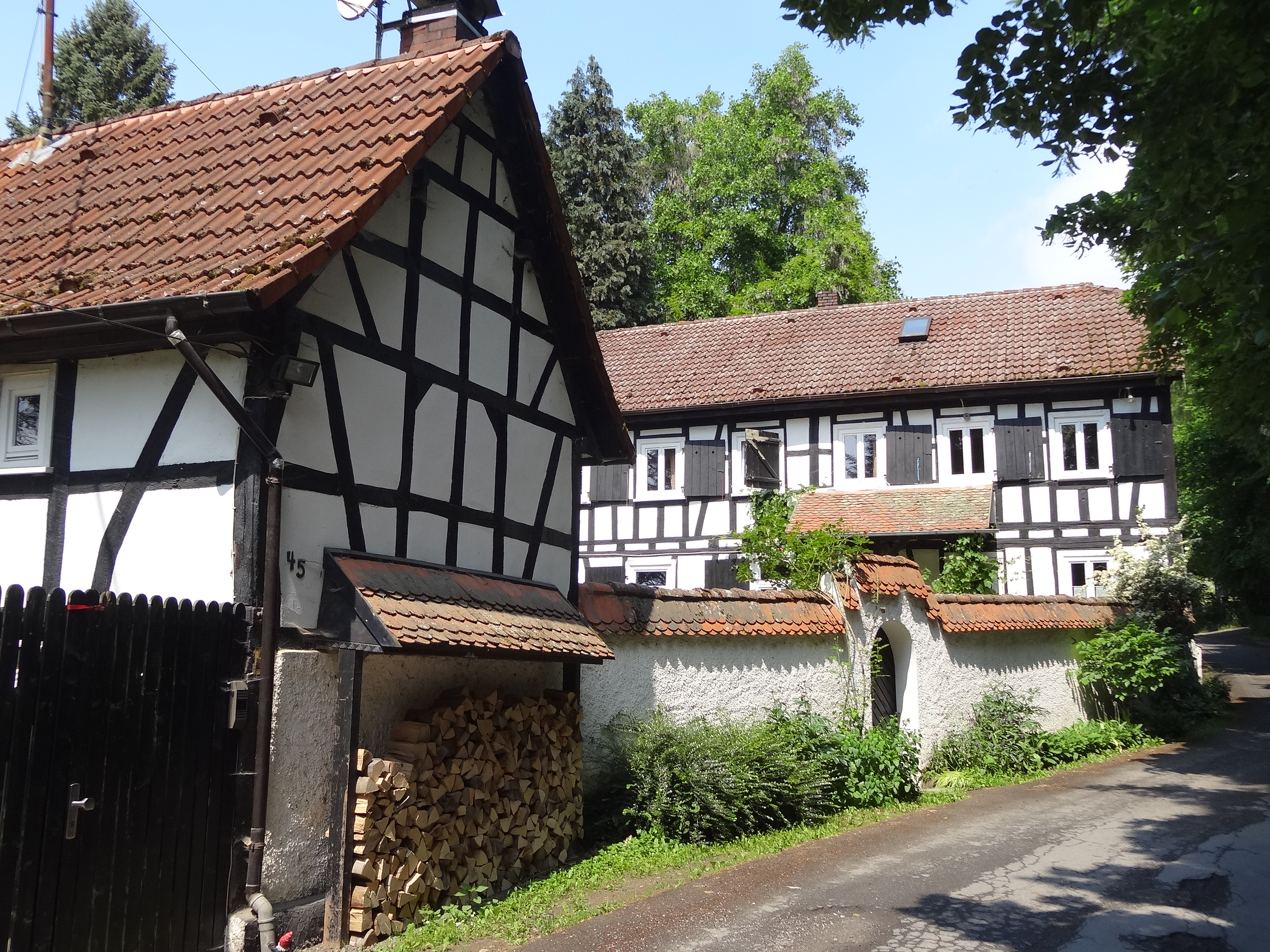 Lochmühle 45 (Münster, Butzbach)